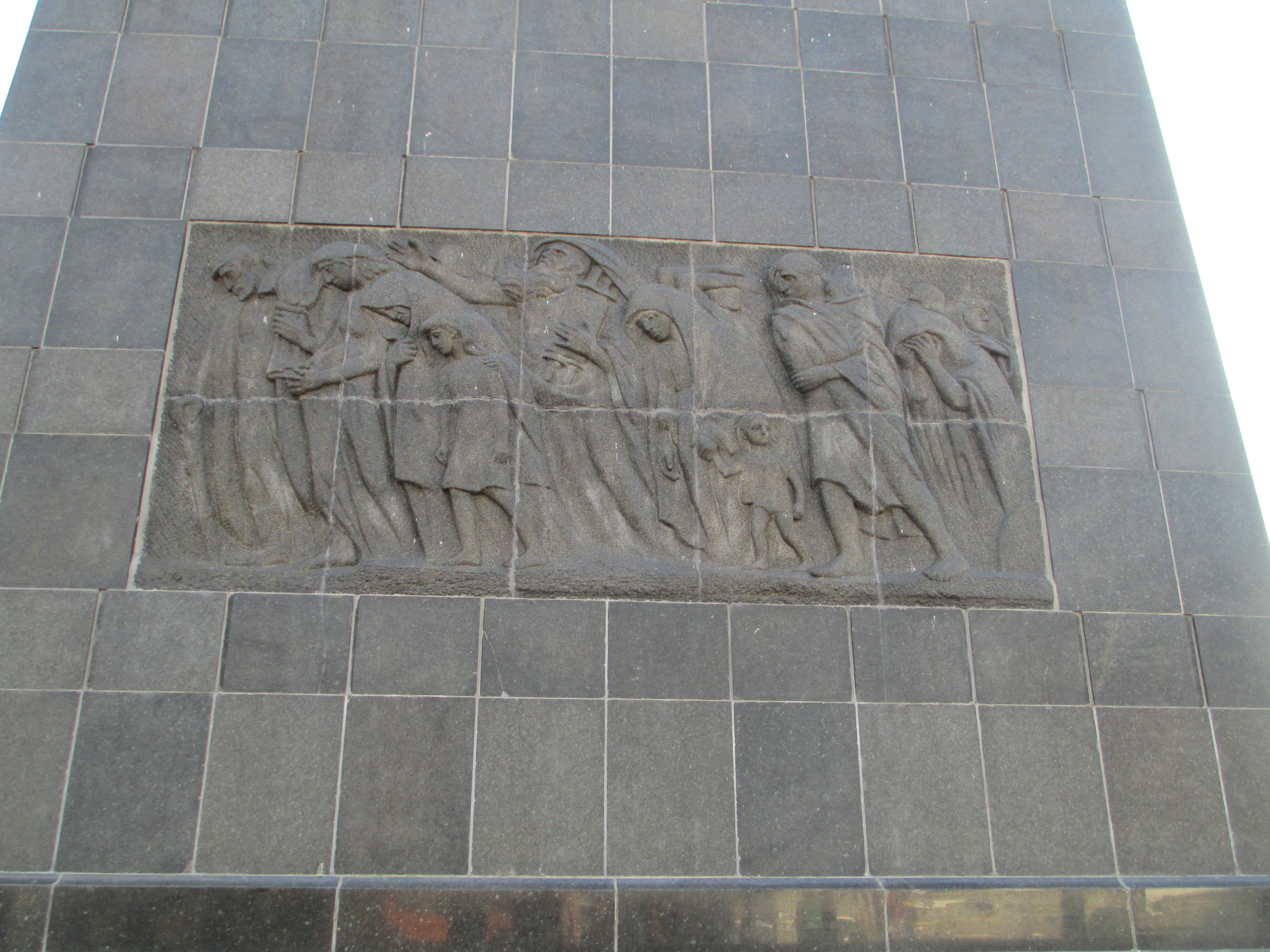 החלק האחורי של אנדרטת מרד גטו ורשה, בוורשה